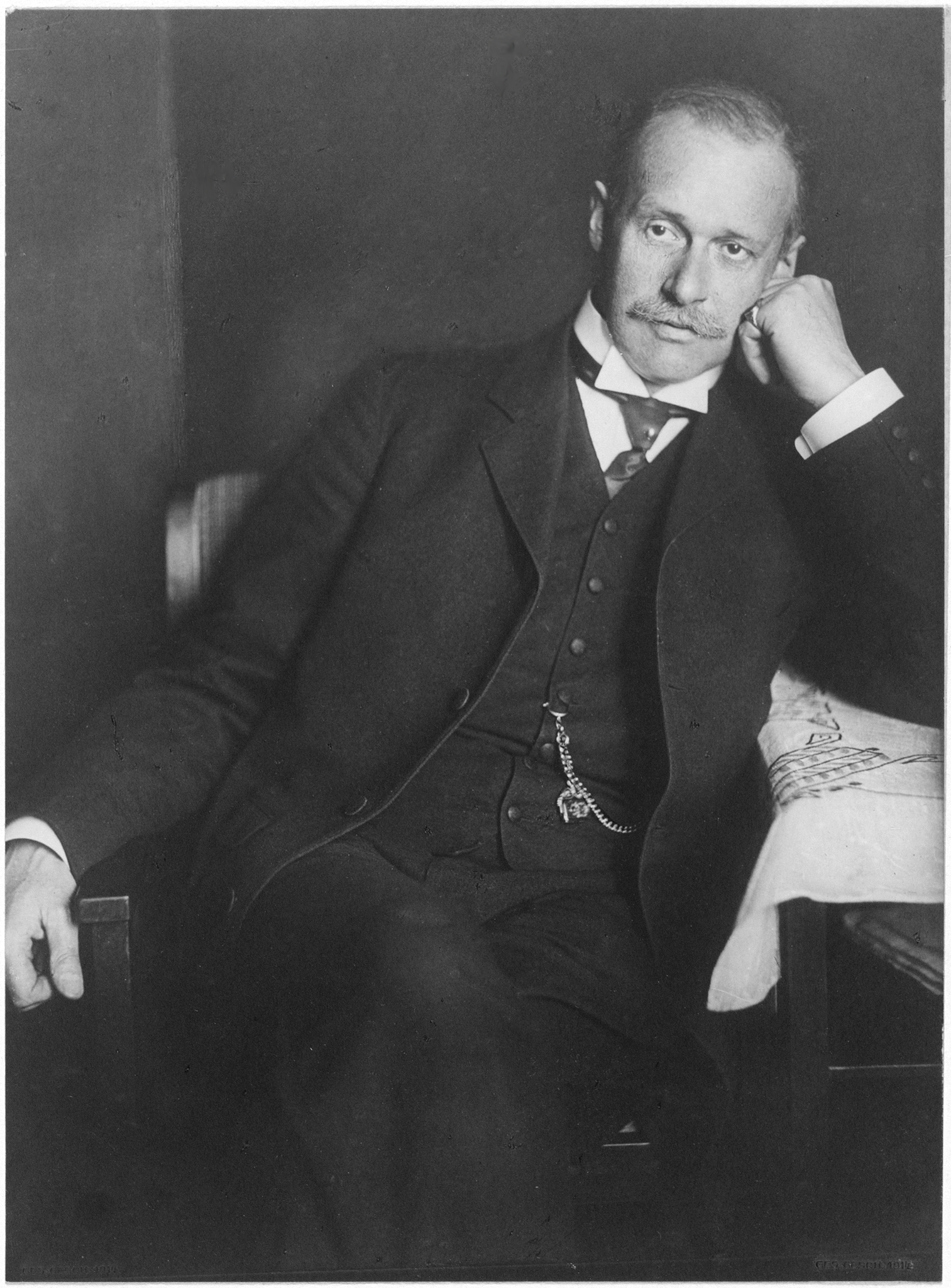 Max Cloetta